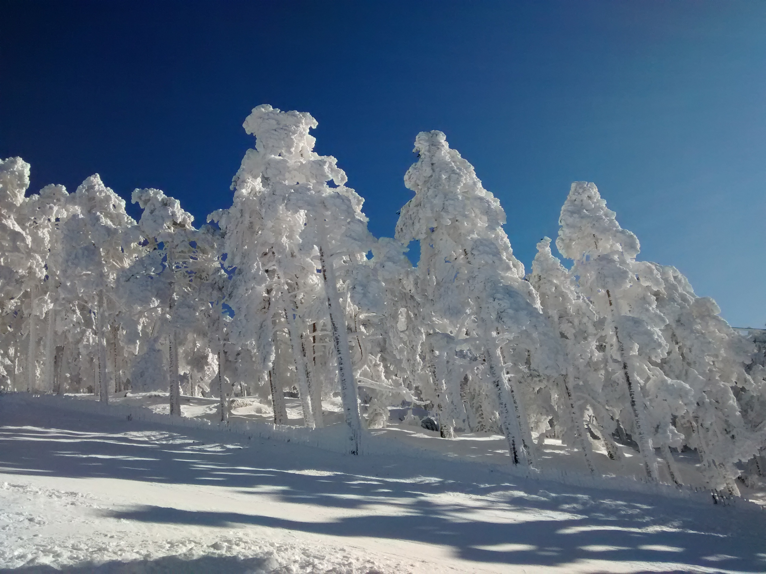 Arboles nevados en la Sierra de Guadarrama This is a photography of a Special Area of Conservation in Spain with the ID: ES4160109. Natura2000 entry, EEA entry